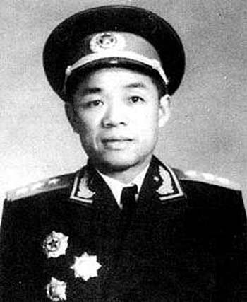 韩先楚将军授勋照